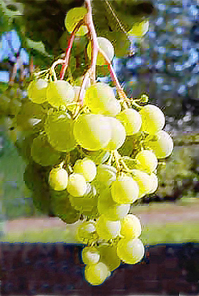 Grappe de perle de Csaba